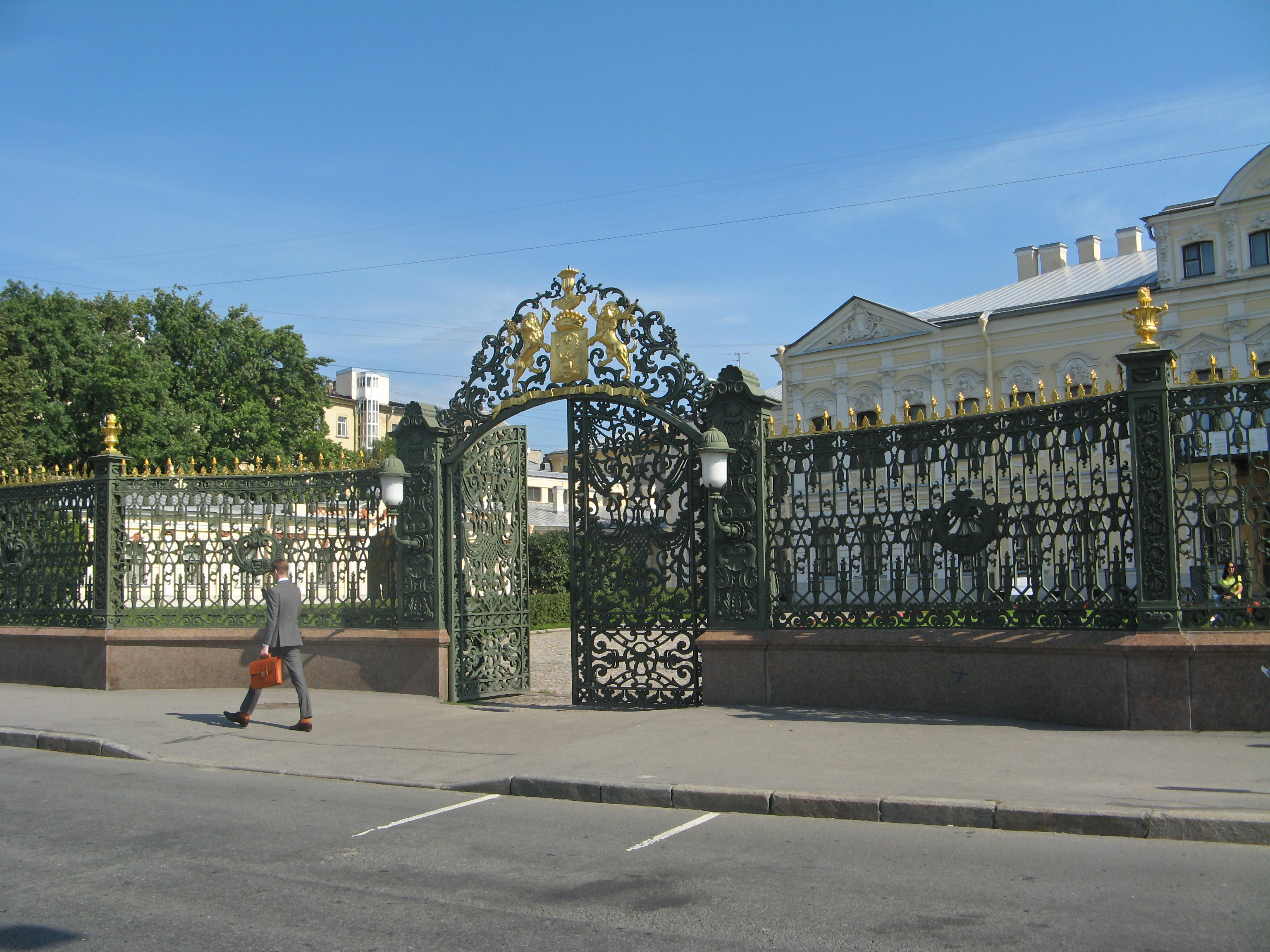 Дворец Шереметевых. Ограда с воротами: набережная р. Фонтанки, 34, Центральный район, Санкт-Петербург